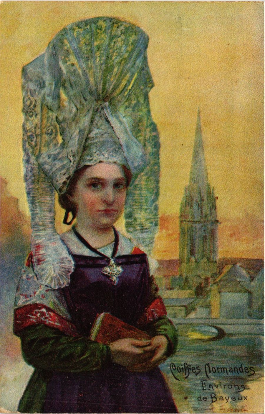 Coiffe des environs de Bayeux, dite La Bourgogne.